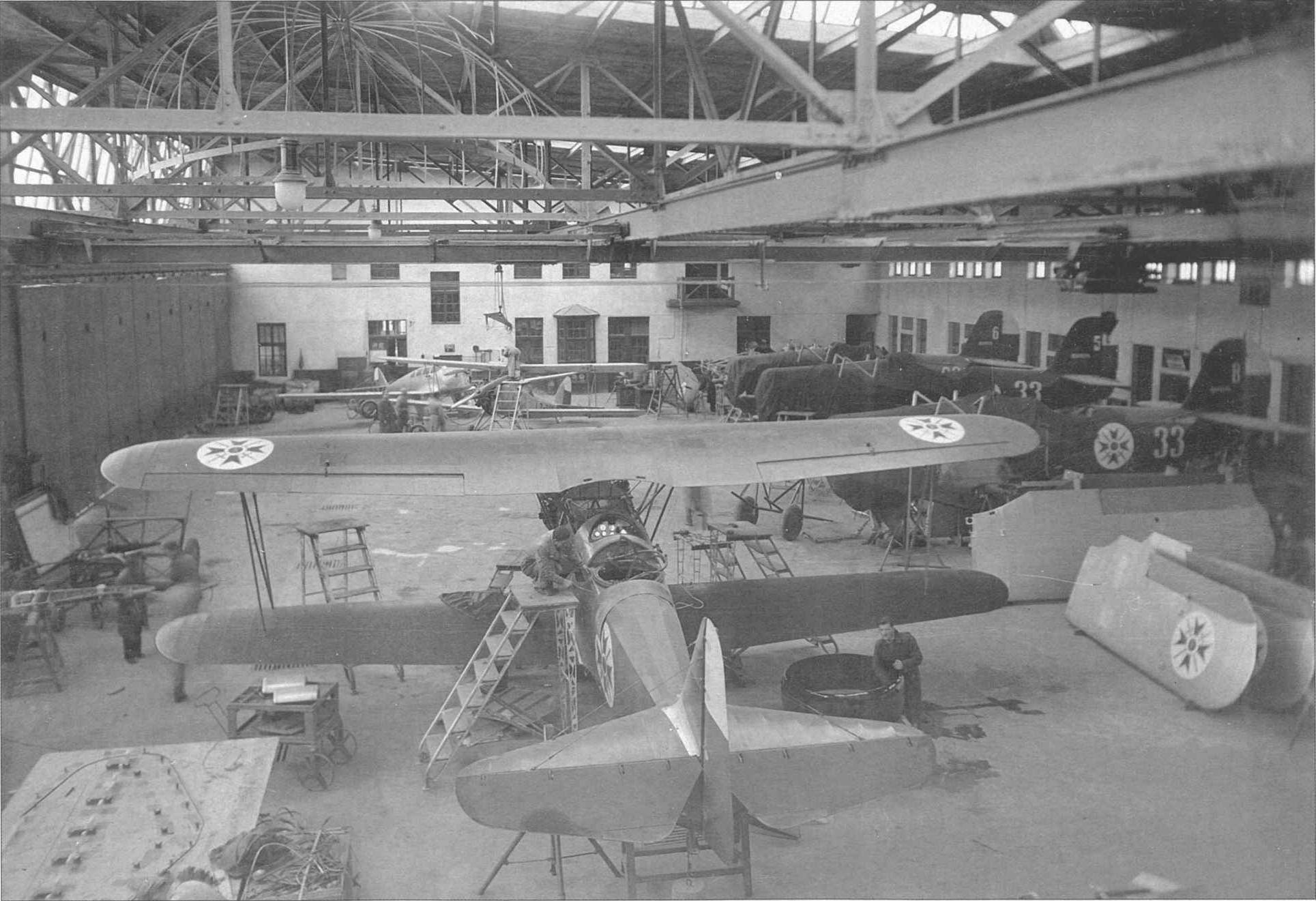 A Bulgarian DAR-3 Garvan-1 (in the forefront) and DAR-7ss.1 (to the rear) share the Bojurishte maintenance shop with German Heinkel HE-45b Shturkel in 1936